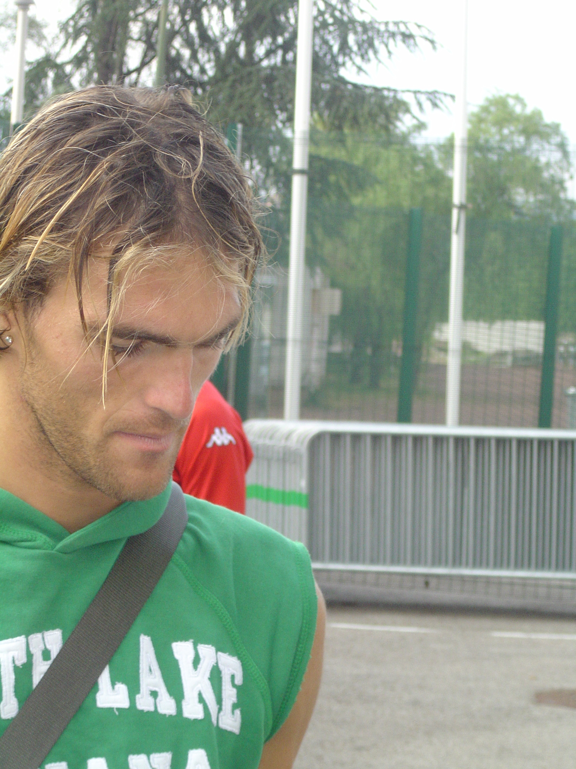 Photo du joueur de football Julien Sablé lors de la saison 2004-2005. Cette photo a été prise par Mickaël Roure alias Altrensa pour Wikipédia. Elle ne saurait être utilisée sans la mention de son auteur. D'avance merci.